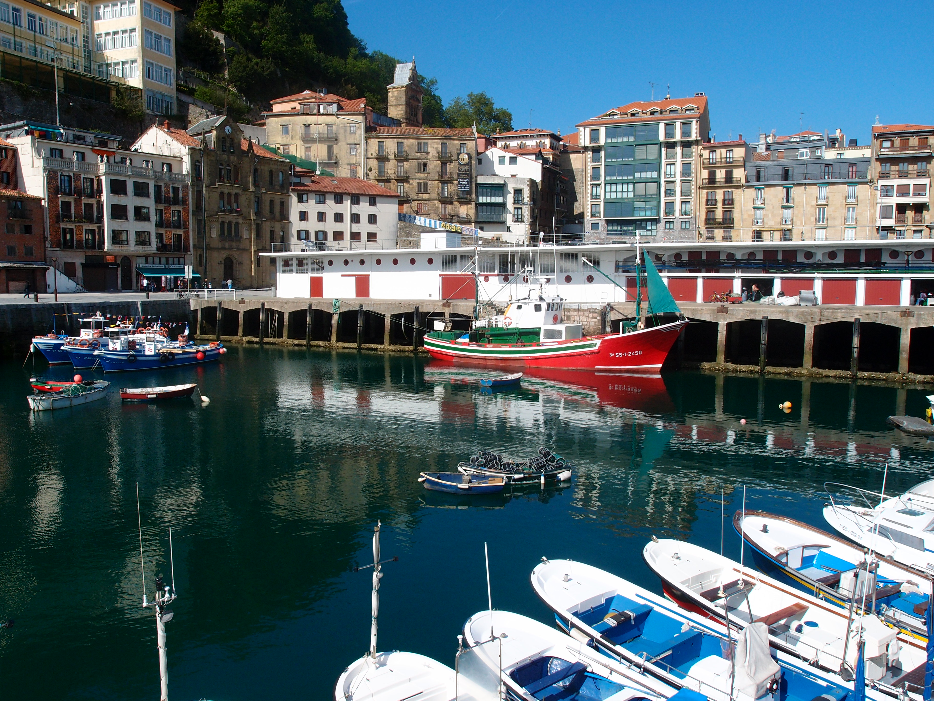 Hafen (Teilansicht) von Donostia - San Sebastian Datum: 07.05.2014 Urheber: M. Pfeiffer alias Gordito1869 Quelle: Privates Fotoarchiv des Urhebers